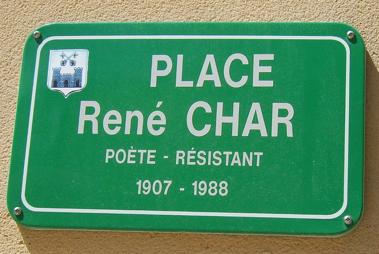 Platz "René Char" in Bollène, Dichter und Widerstandskämpfer